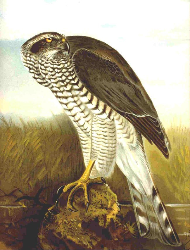 Habicht (Accipiter gentilis)